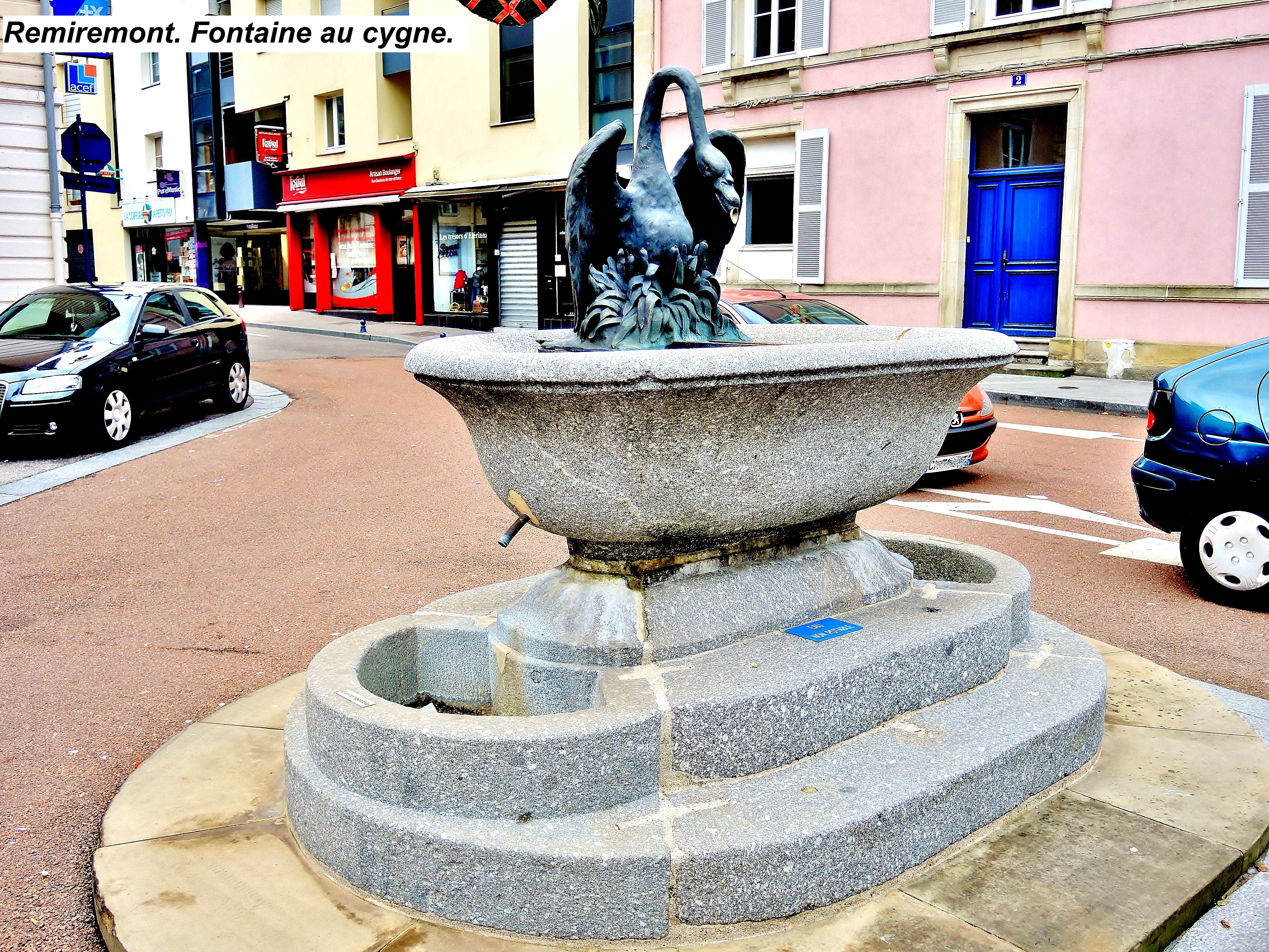 Fontaine au cygne. Ville de Remiremont. Vosges.